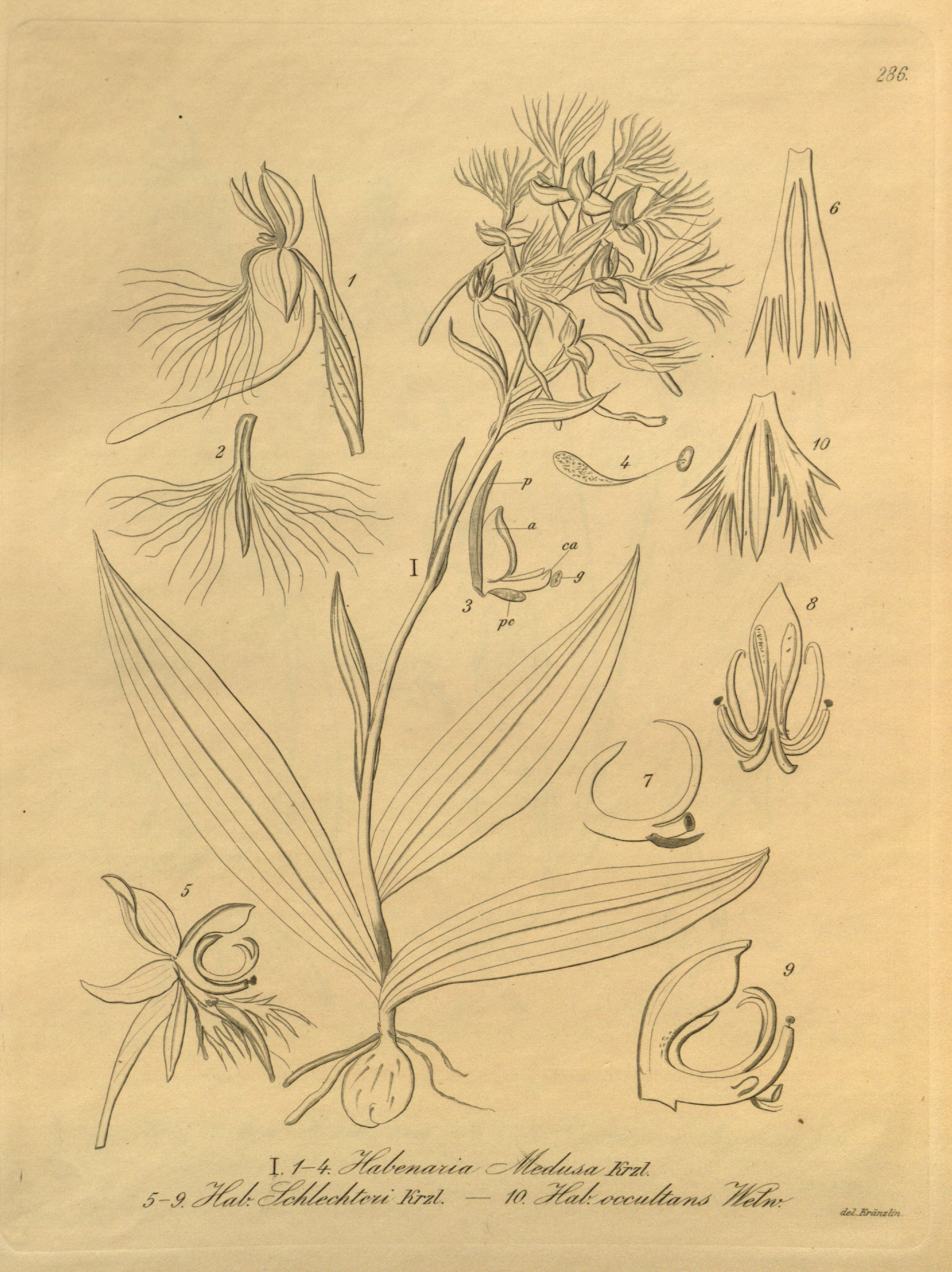 Illustration of fig. 1-4. Habenaria medusa fig. 5-9. Centrostigma occultans (as syn. Habenaria schlechteri) fig. 10. Centrostigma occultans (as syn. Habenaria occultans)